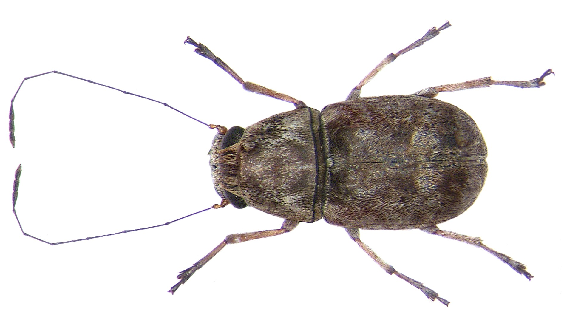 Familie: Anthribidae Grösse: 3,7 mm Fundort: Indonesien, Molukken, Ternate leg. A.Skale, 2006; det. R.Frieser Foto: U.Schmidt, 2007